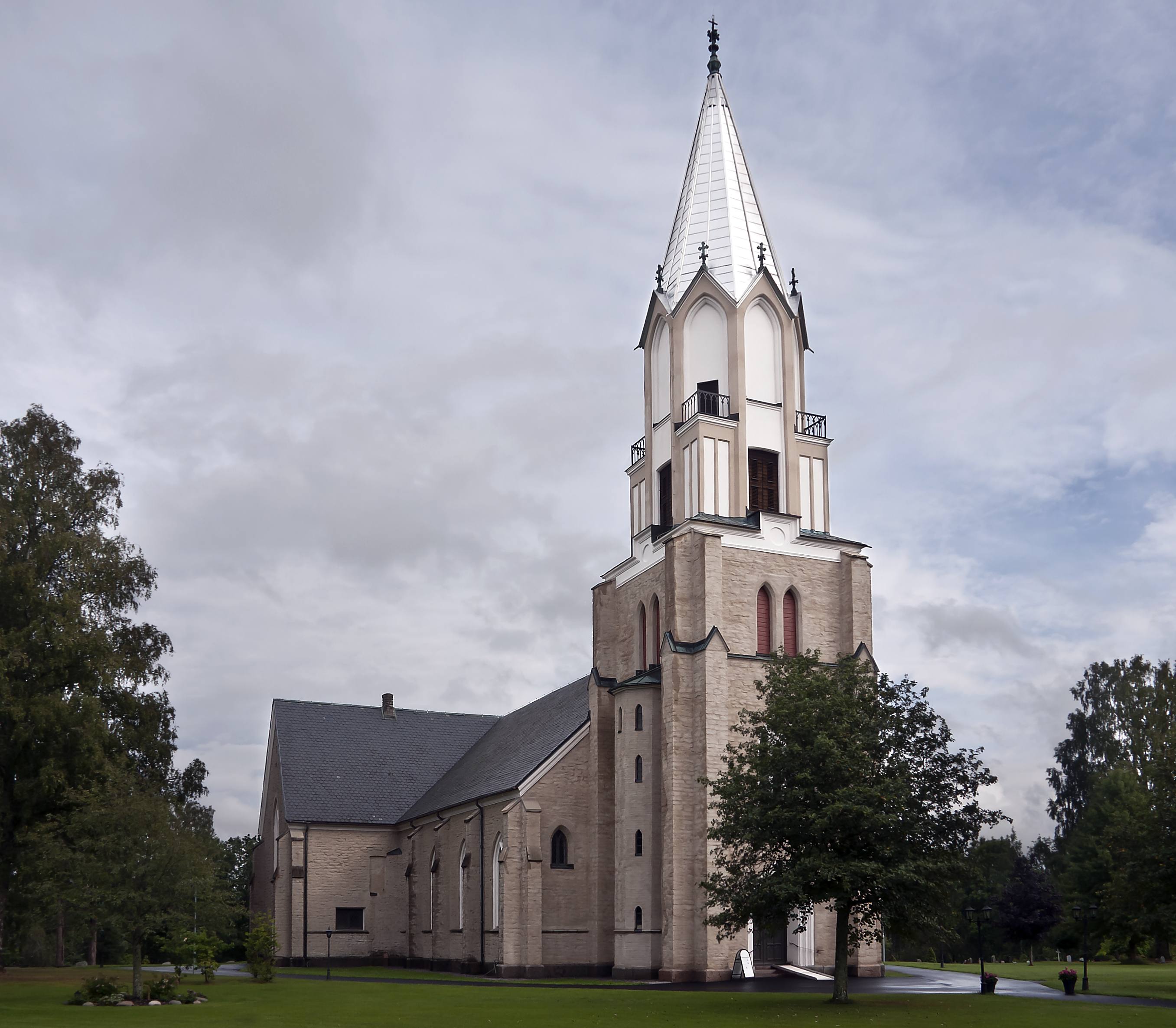 Hidinge nya kyrka i Lekebergs kommun i Närke.